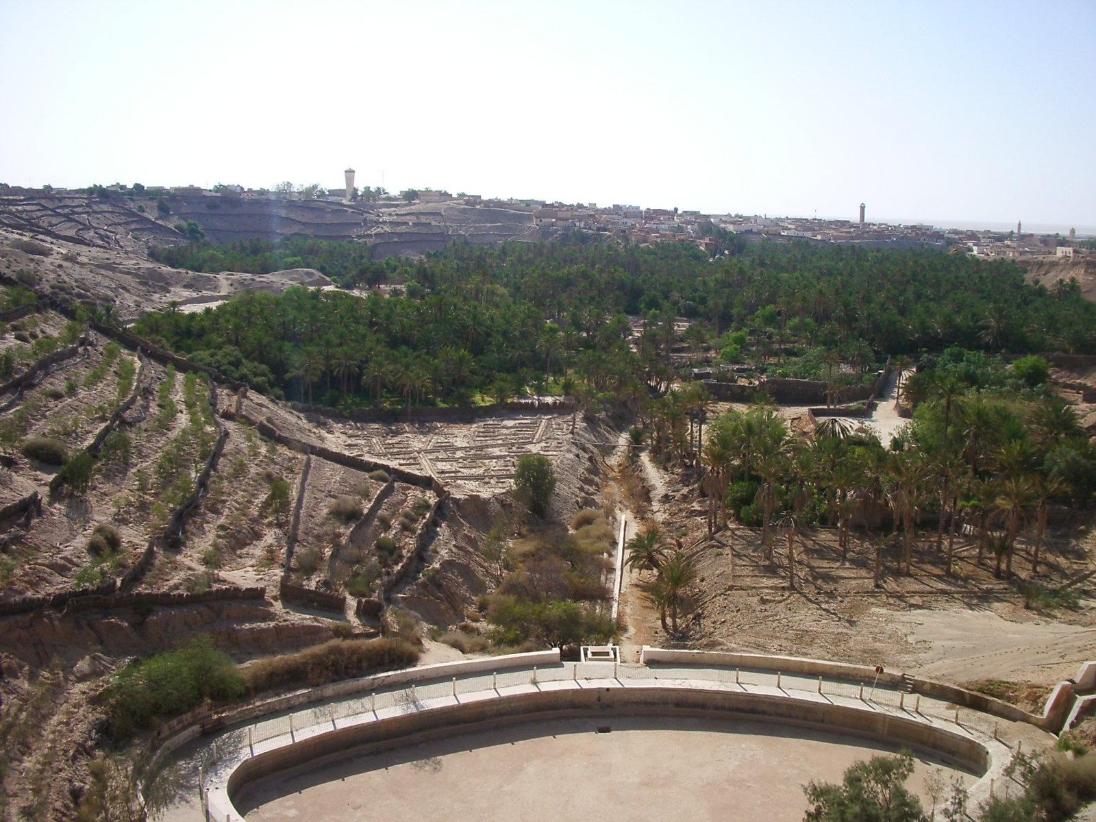 Nefta, bassa i petir palmerar